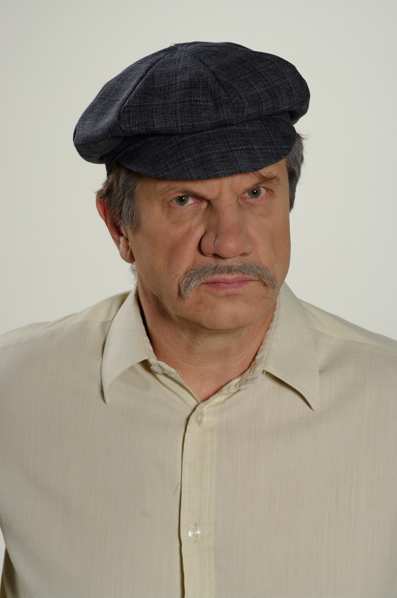 Hannes Kaljujärv lavastuses 'Minu järel, seltsimees'.